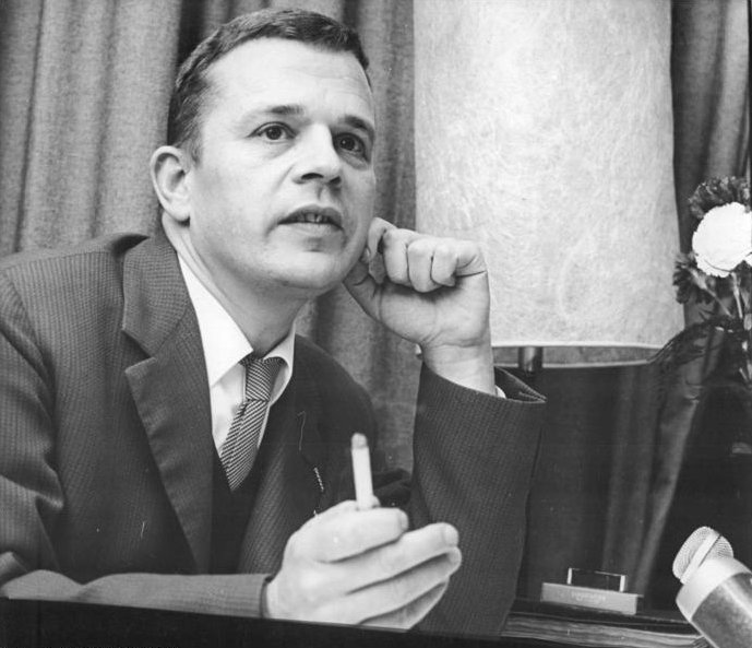 Peter Hacks vor Westberliner Studenten Zentralbild - 13. 2. 1965 Peter Hacks vor Westberliner Studenten Peter Hacks (unser Foto), dessen Stück "Die Schlacht bei Lobositz" gegenwärtig vom Westberliner Studententheater gespielt wird, stellte sich am 12.2.1965 innerhalb der Reihe "Sozialistische Schriftsteller lese" in der westberliner Studentenstadt Siegmundshof vor. Abgebildete Personen: Hacks, Peter Dr.: Schriftsteller, DDR (GND 118544330)